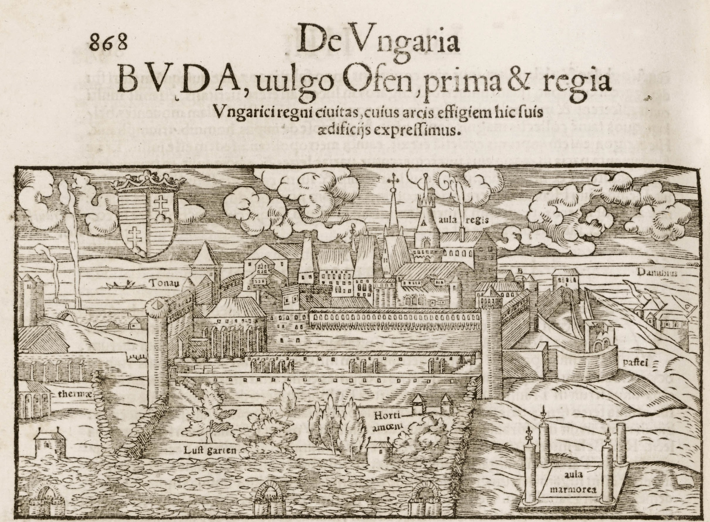 Buda látképe Szapolyai János idejében, illusztráció Sebastian Munster Cosmographiae Universalis című művéből